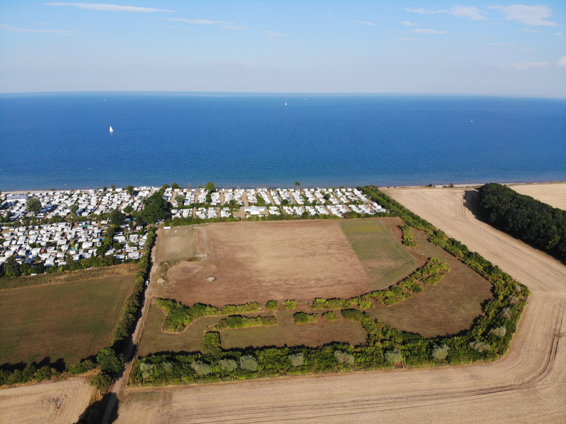 Der gerodete Platz zum Klintdoerp auf dem Campingplatz "Hohes Ufer" in Godderstorf